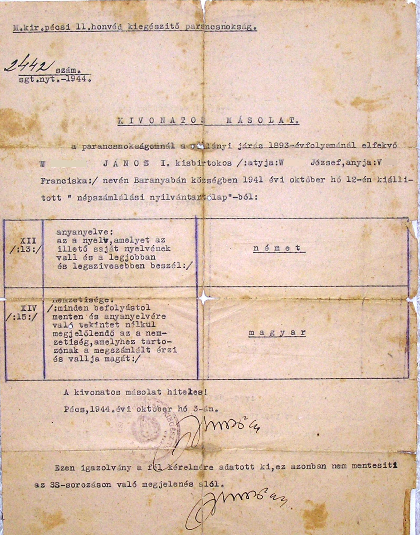 Az 1941-es cenzus. Az ekkor bevallottak alapján végezték a kitelepítéseket Magyarországról.